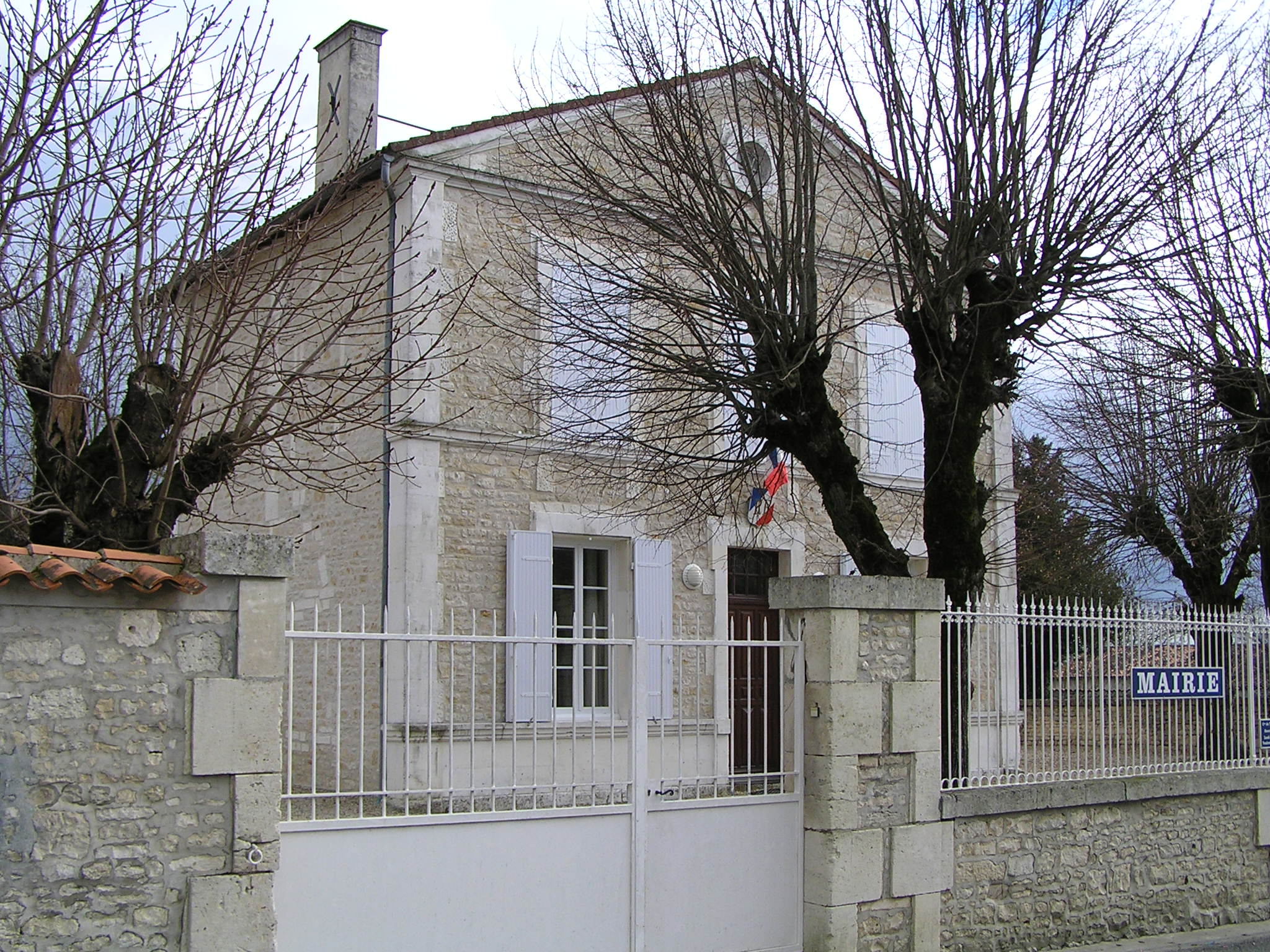 mairie de Triac-Lautrait